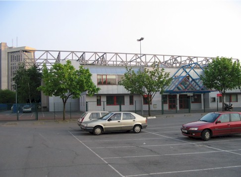 Vue du palais des sports de Créteil (Val-de-Marne) Source : photo personnelle (Clio64). Catégorie:Créteil